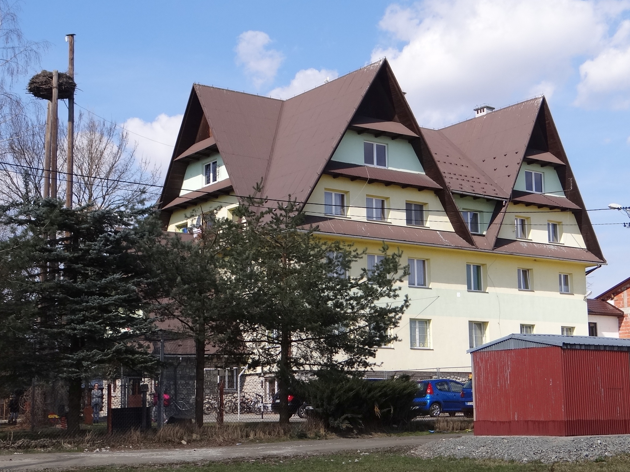 Rogoźnik